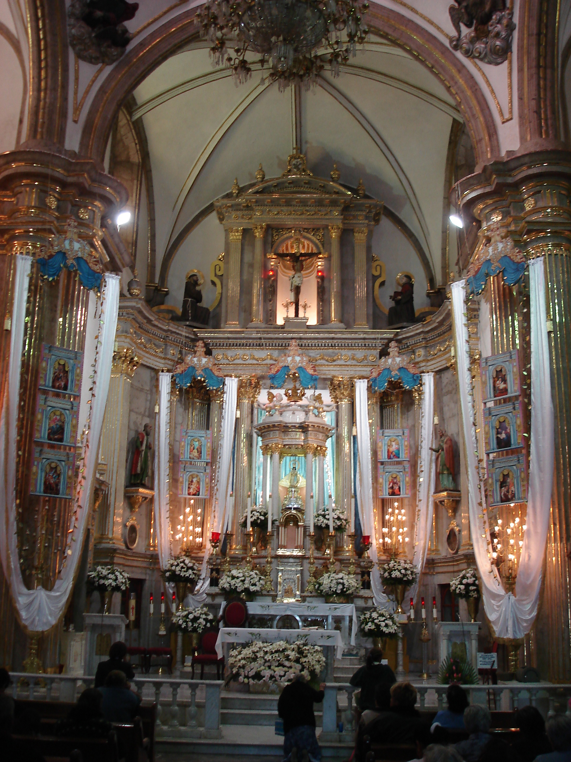 Interior, con altar, de la Basílica de Zapopan — Zapopan, Jalisco.